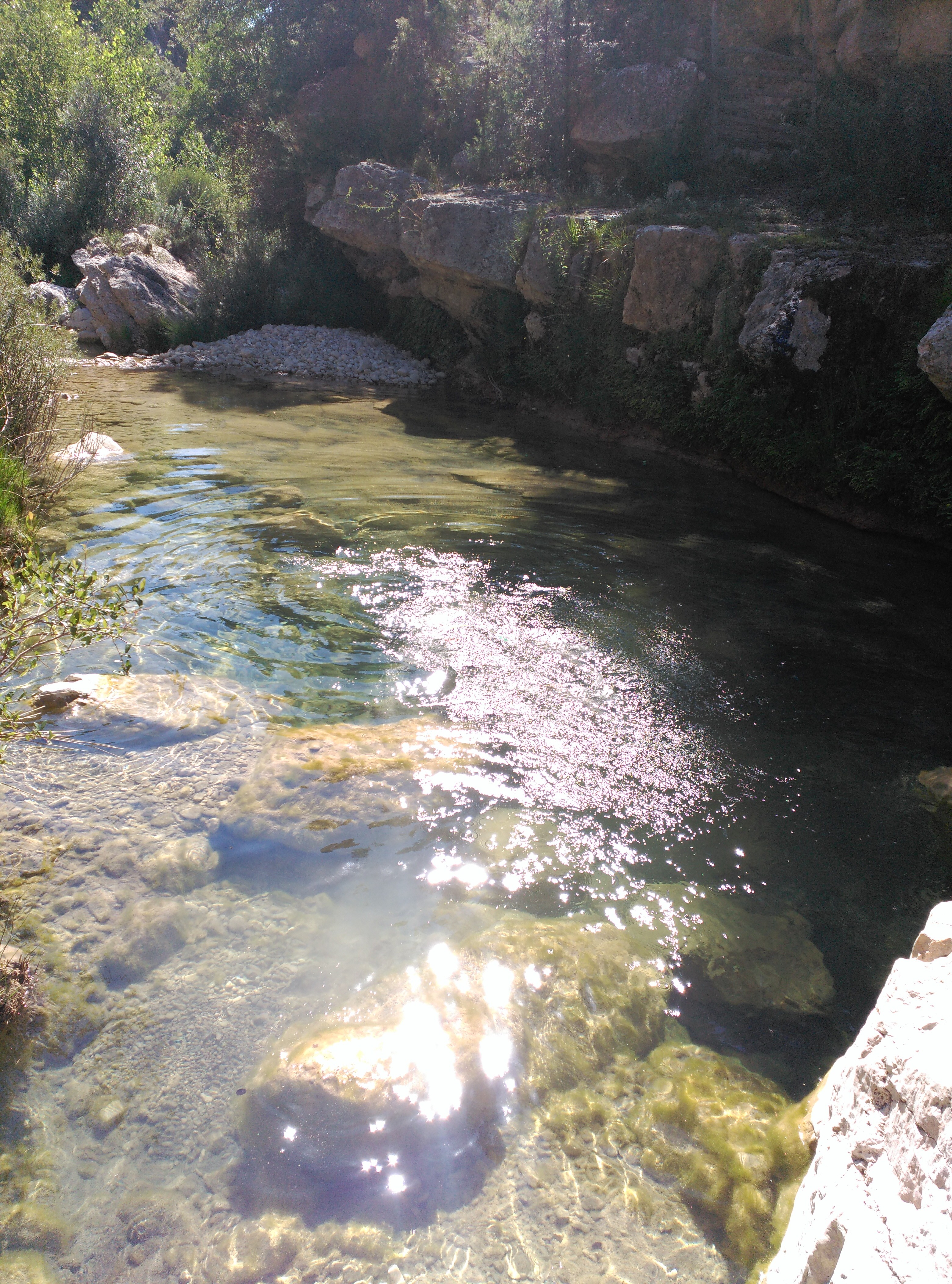 Toll del riu Cervol a prop de la font de la Canaleta, Molí de Rico (Morella, País Valencià)